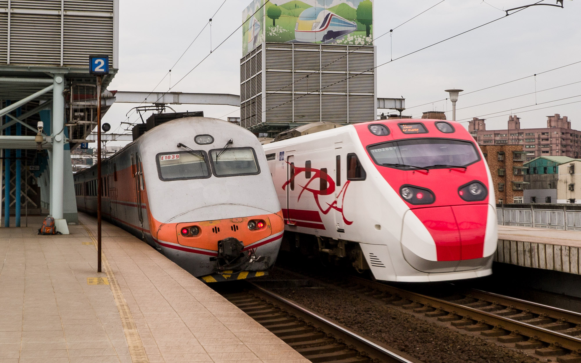 第 114 車次自強號與第 226 車次普悠瑪號順行西部幹線北段 TRA Sijhih Station